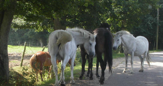 eigen foto